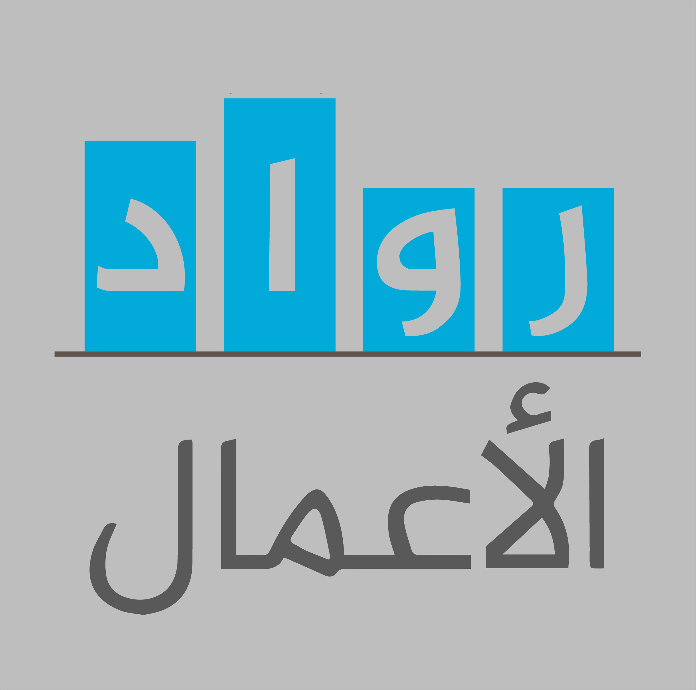 لوجو برنامج رواد الأعمال